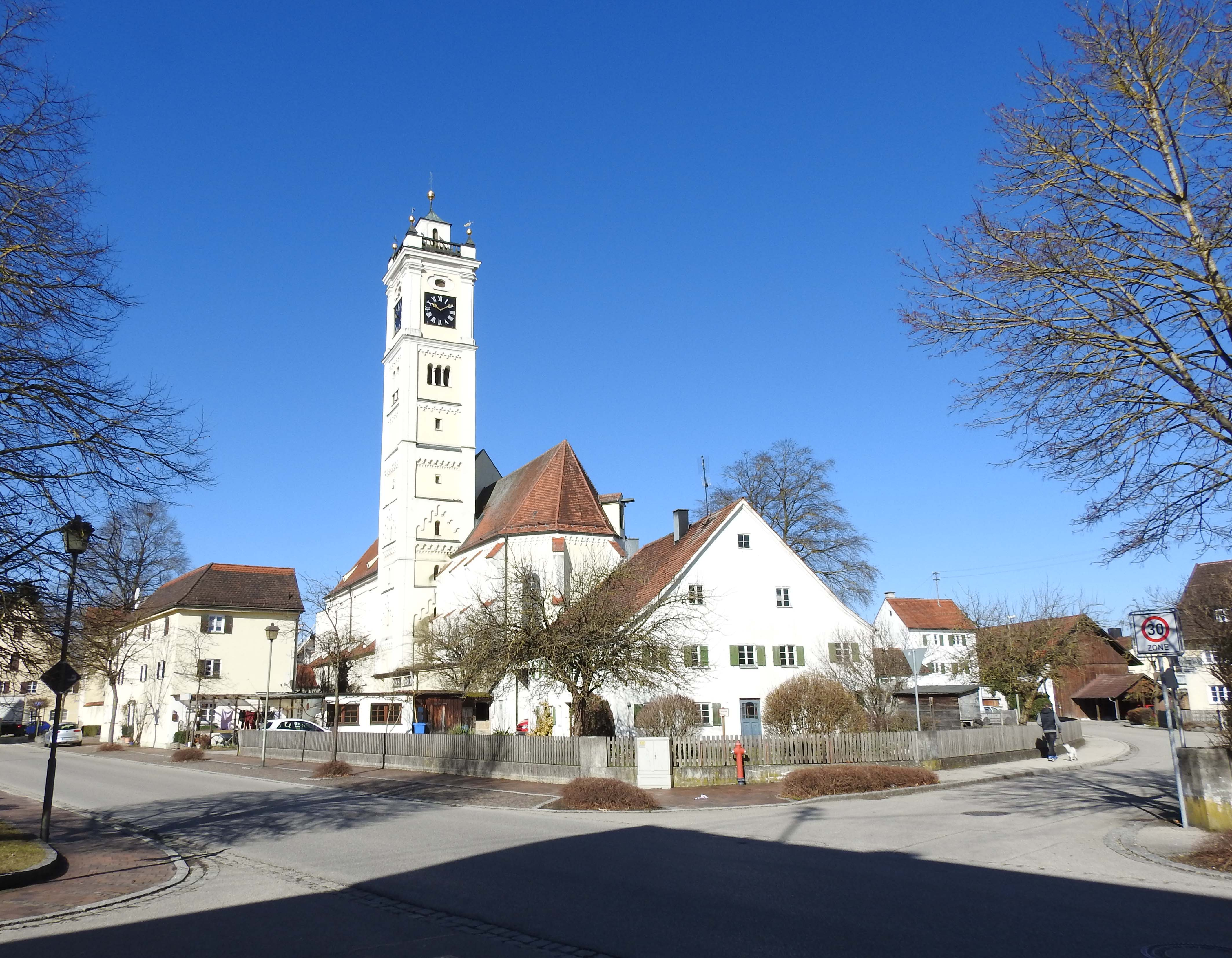 Pfarrkirche und ehem. Waaghaus in Türkheim